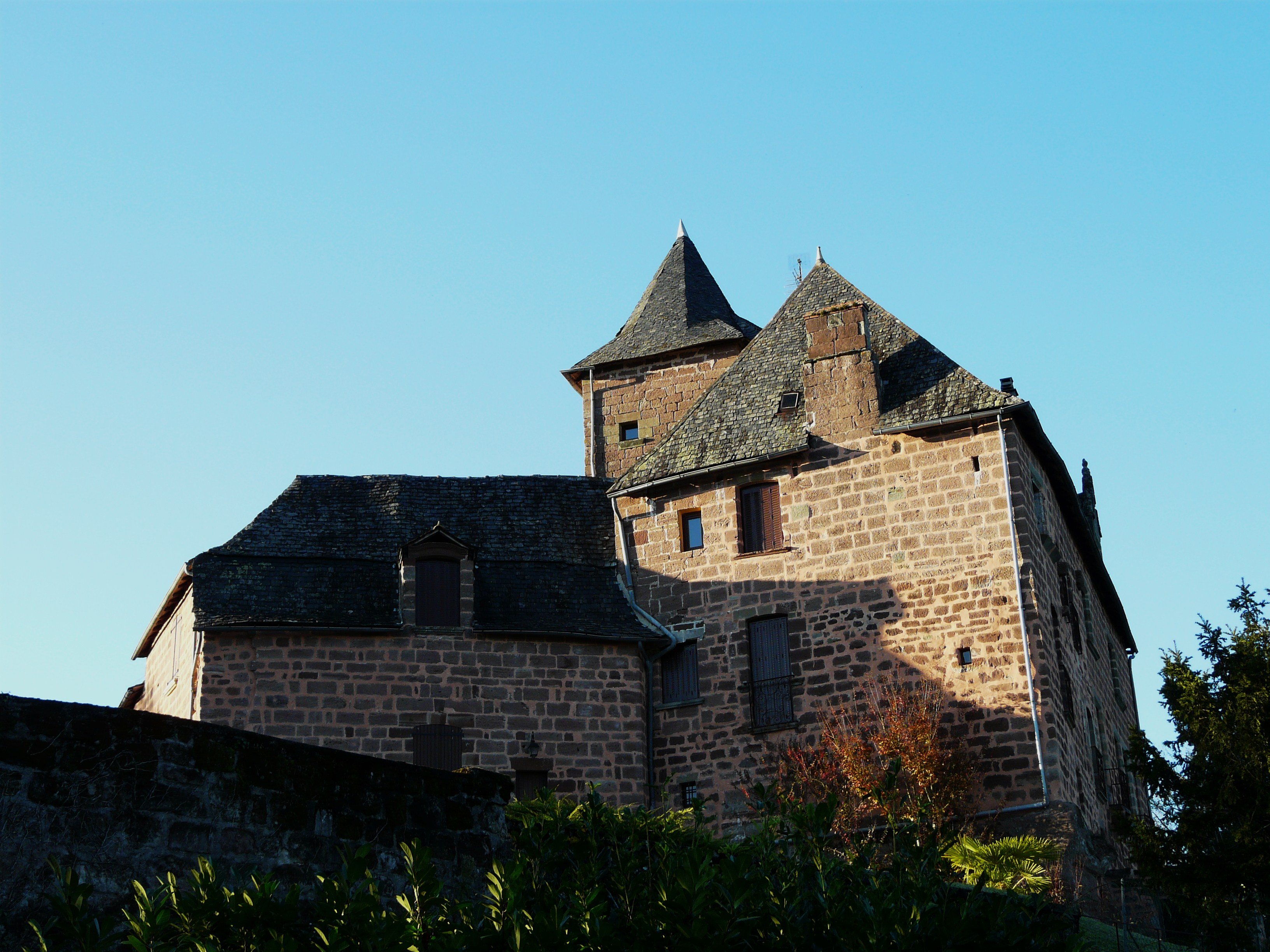 Le manoir de Saint-Cyr-la-Roche, Corrèze, France